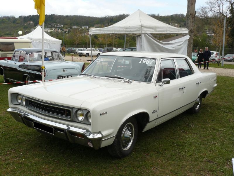 Mantes la Jolie 2012